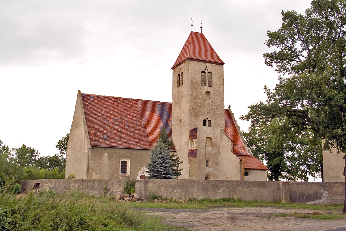 Chotków - kosciol z XIII w.